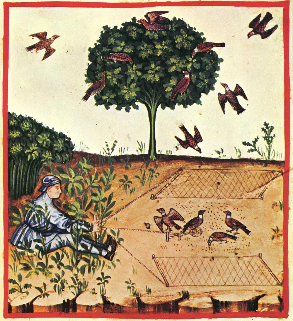 Tacuina sanitatis (XIV century)